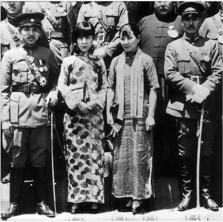 蒋介石夫妇在南京迎接张学良夫妇